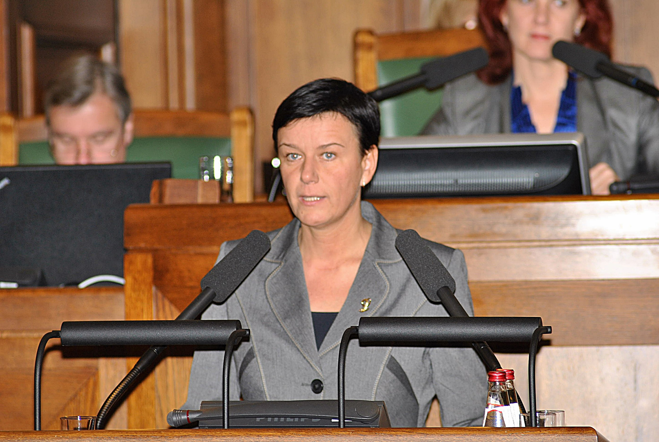 2010.gada 4. novembra ārkārtas sēde. Deputāta svinīgo zvērestu dod Linda Mūrniece. Foto : Saeima